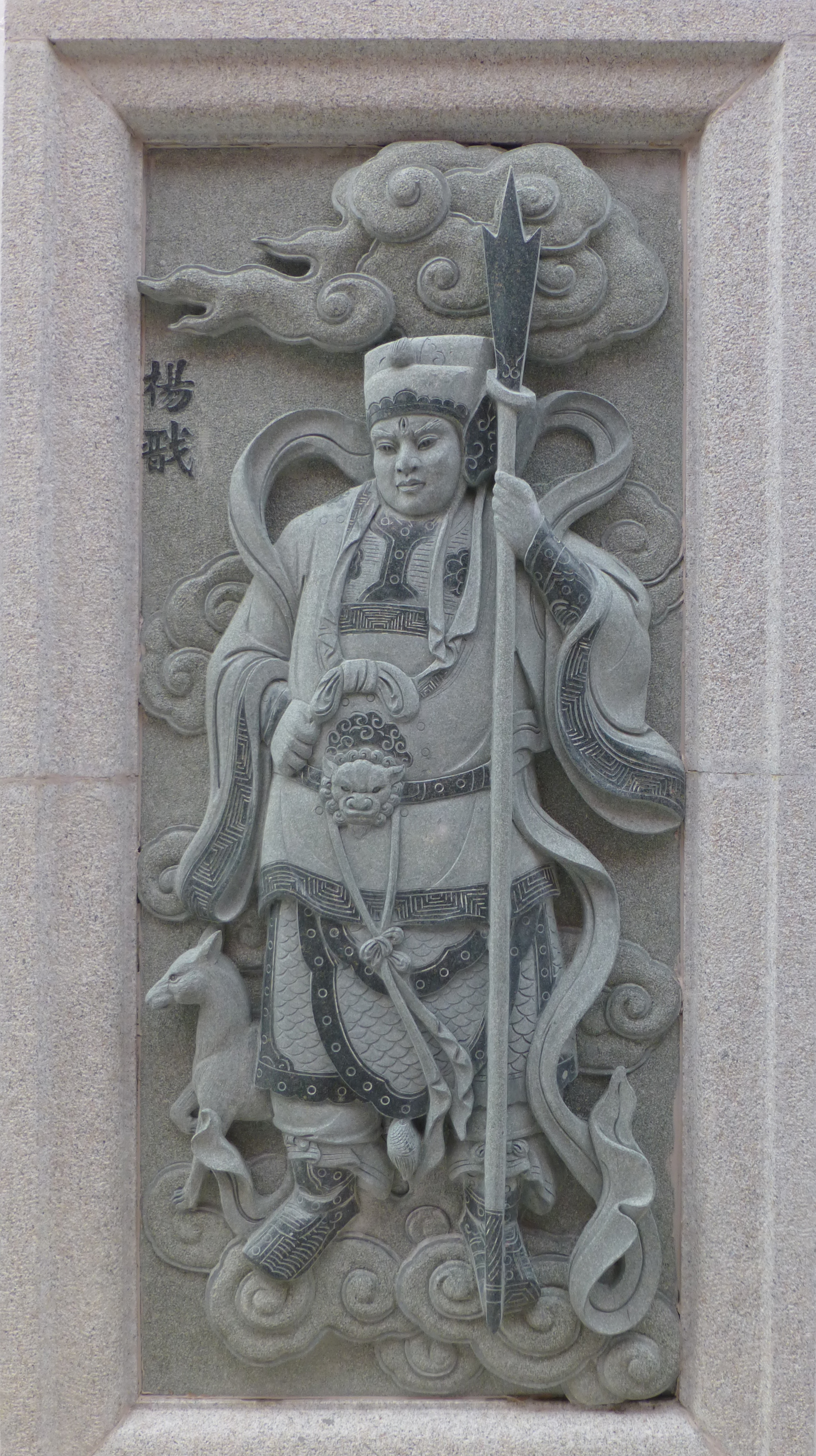 011 Yang Jian (Erlang Shen), Investiture of the Gods at Ping Sien Si, Pasir Panjang, Perak, Malaysia Photograph from the Ping Sien Si Temple in Perak, Malaysia taken by Anandajoti.